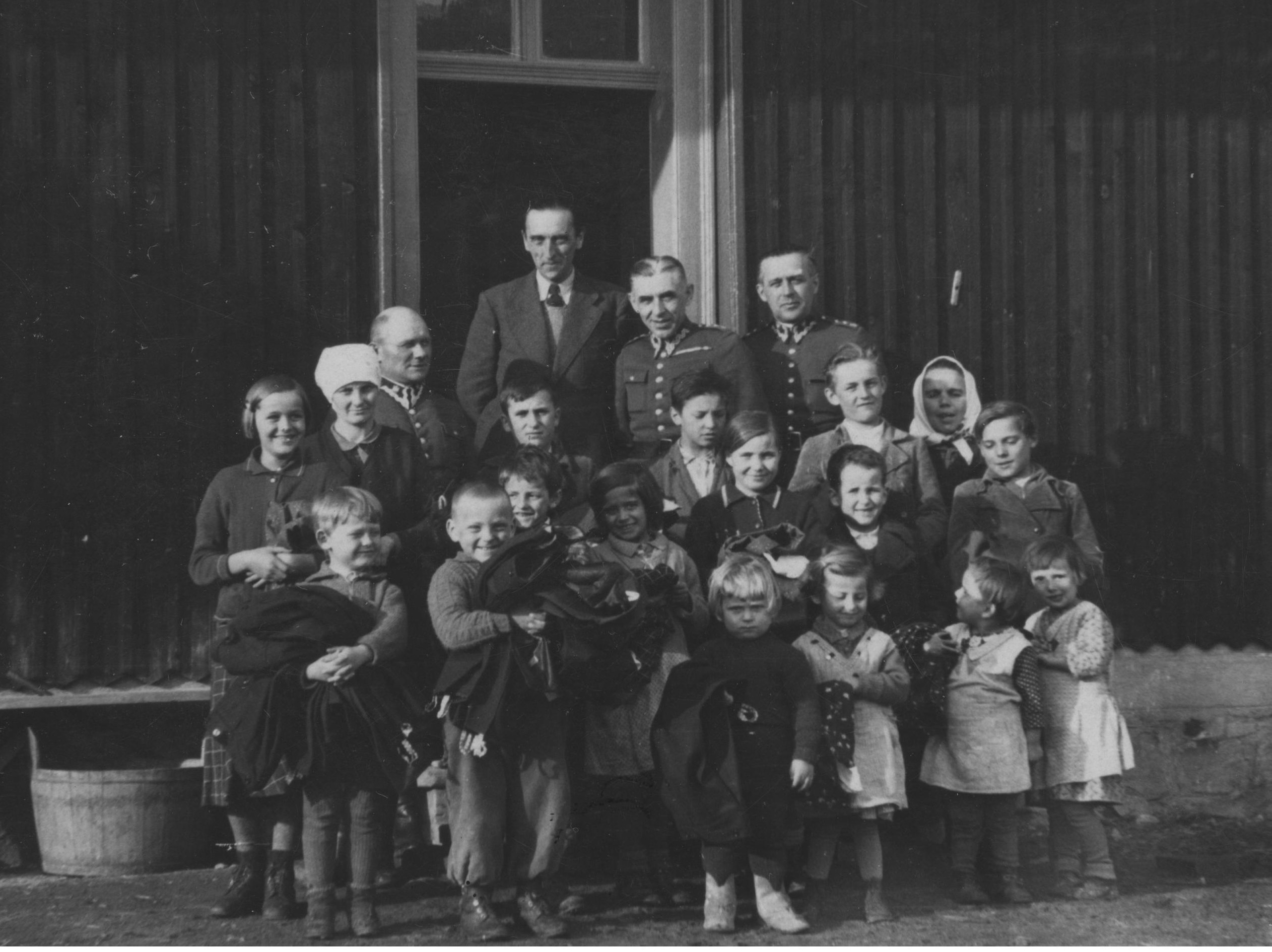 Grupa dzieci w Podspadach obdarowana ubraniami ofiarowanymi przez Obwodową Komendę Straży Granicznej w Nowym Targu. Widoczni także m.in. komisarze Straży Granicznej: Widecki i Roman Bogdanowicz. Koncern Ilustrowany Kurier Codzienny - Archiwum Ilustracji. Sygnatura: 1-G-6497